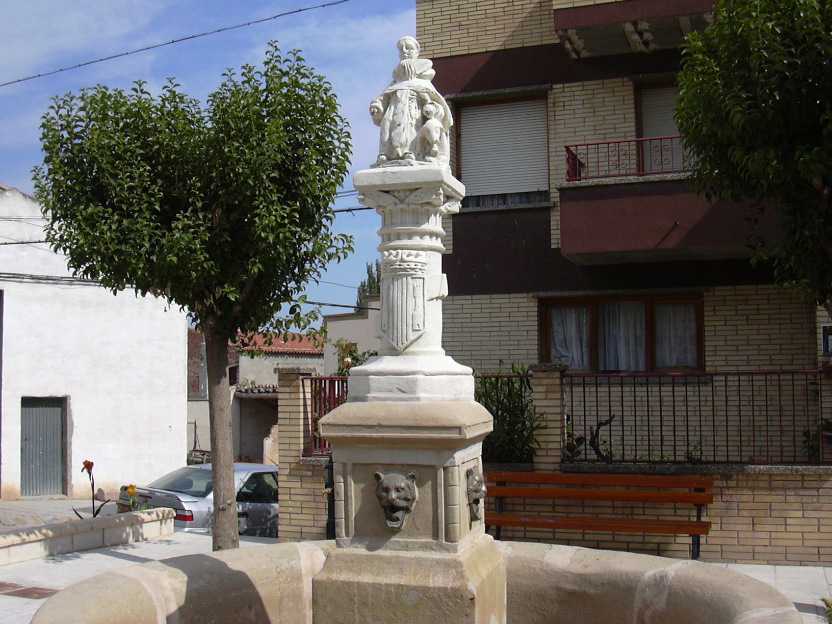 Aragonés: A fuent de Sant Antón ye trobada en o mesmo puesto que ocupaba l'antigo peirón de Sant Antón en Magallón.